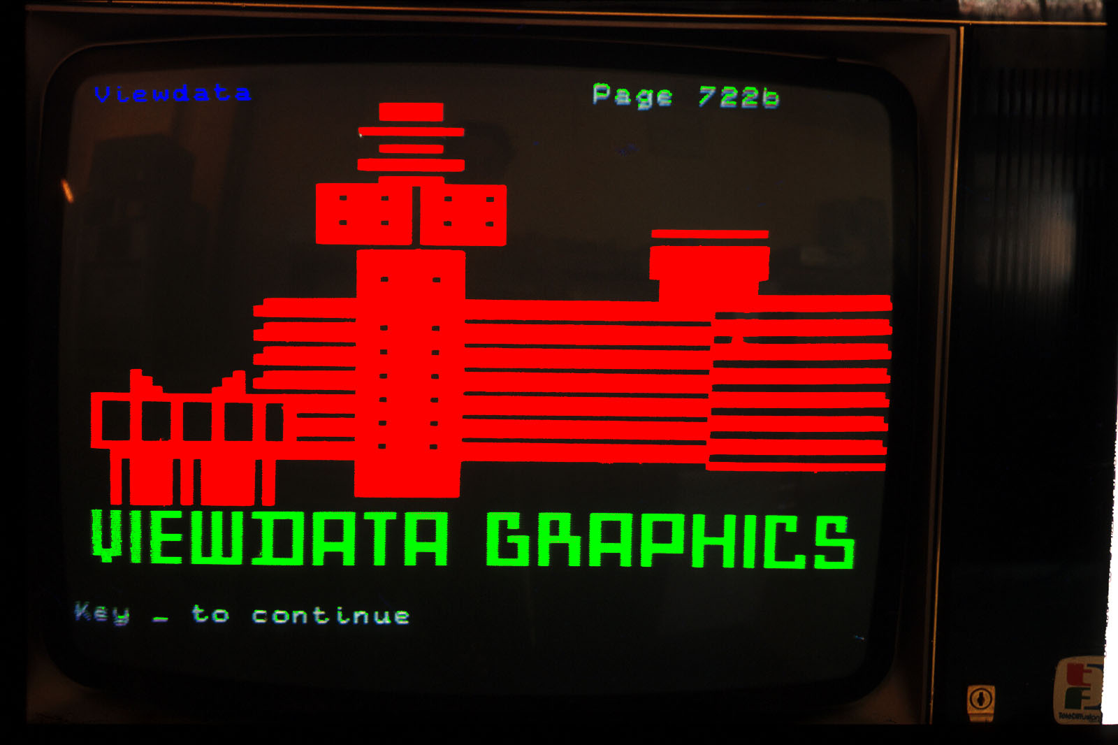 page Viewdata Graphics prise en 1978 sur le service expérimentale du BPO